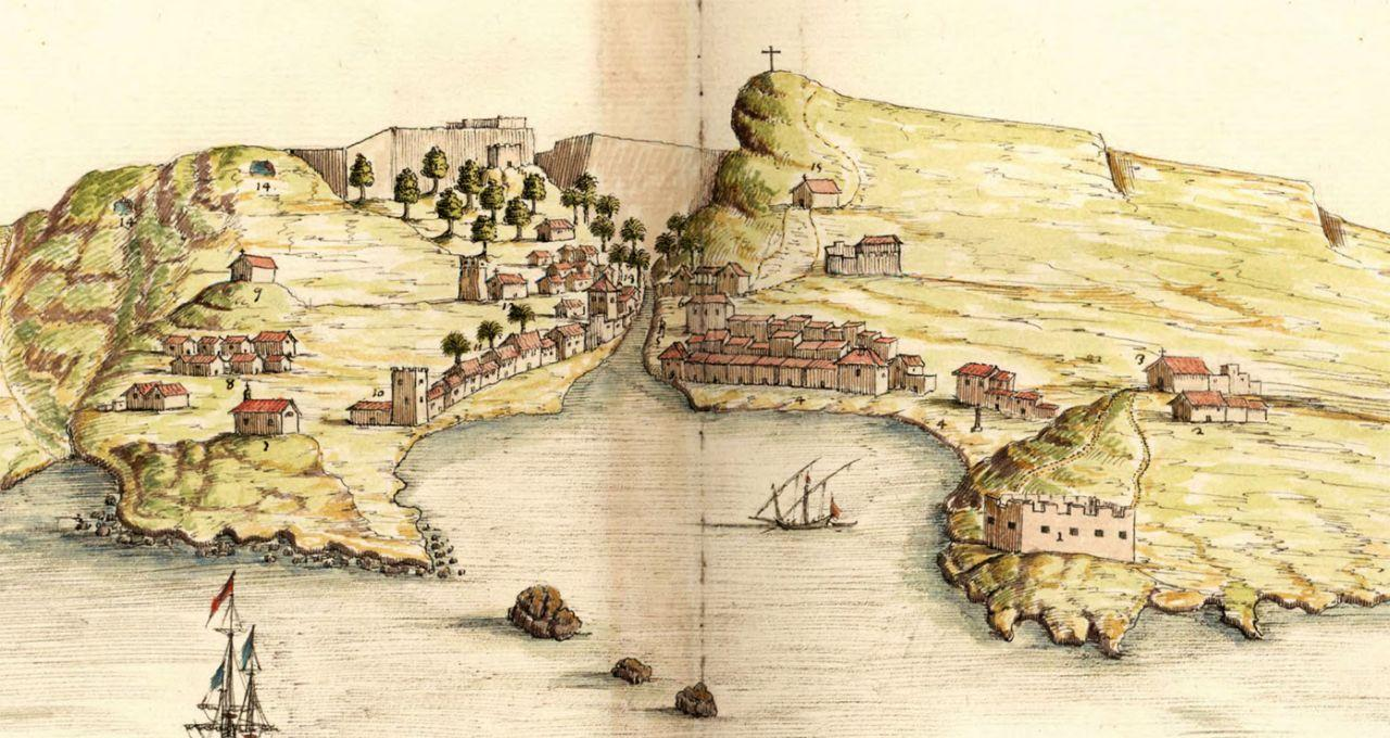 Pormenor da Planta de la Ciudade Cabo Verde Antiga Ribeira Grande, Cidade Velha, ilha de Santiago, Cabo Verde. Vista aguarelada. Atlas de Leonardo de Ferrari, 1655. Arquivo Militar de Estocolmo, Krigsarkivet, (Handritade Kartverk, cota 51-36 1655), Suécia. Publicada por Rocío Sánchez Rubio, Isabel Testón Núñez e Carlos M. Sánchez Rúbio em Imagens de un Imperio perdido. El Atlas del marques de Heliche. Plantas de diferentes Plazas de España, Italia, Flandres y Las Indias, La memoria ausente. Cartografia de España y Portugal en el Archivo Militar de Estocolmo. Siglos XVII y XVIII, Badajoz, 4 Gatos, 2006, Espanha.